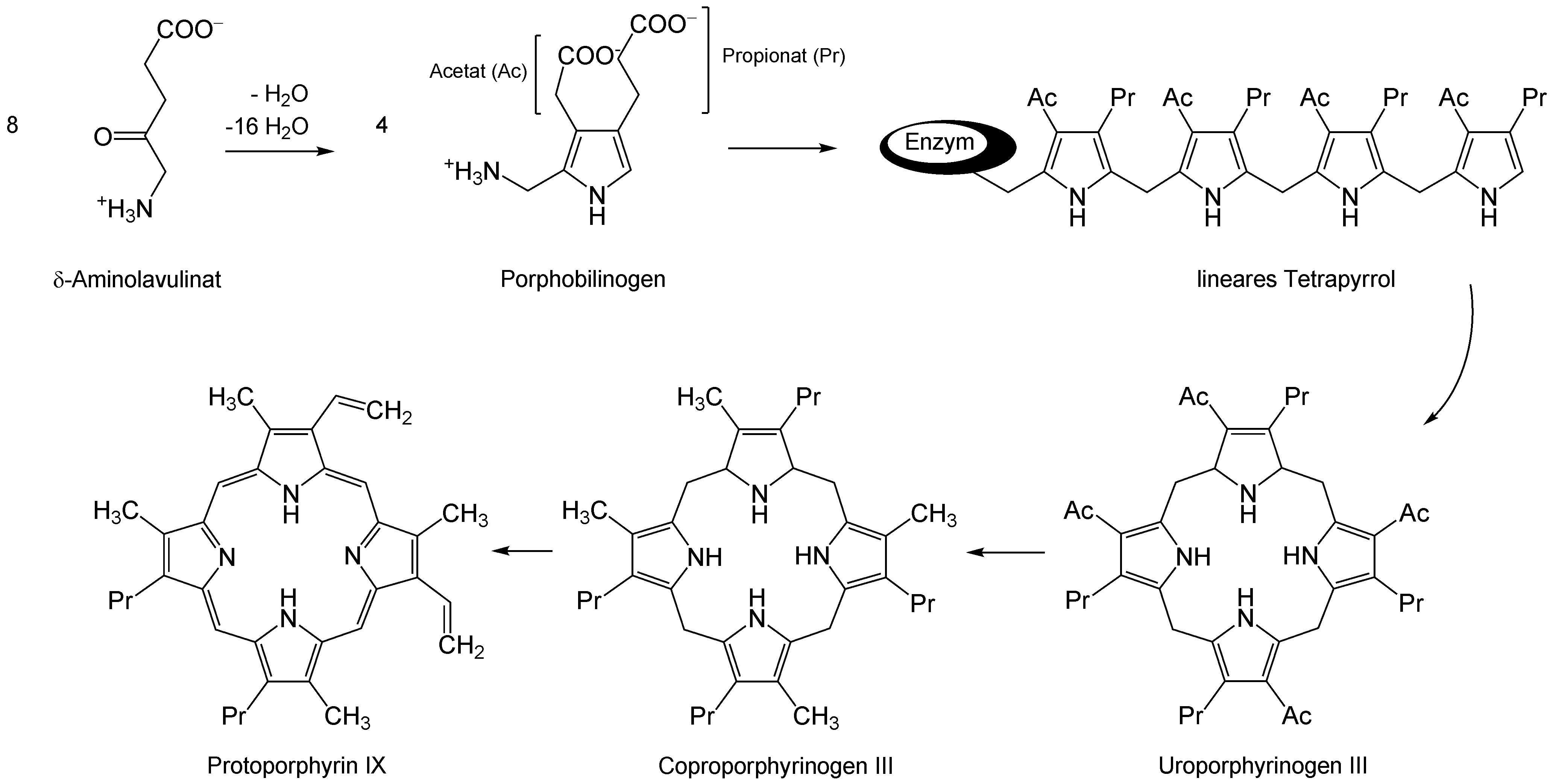 Hämbiosynthese